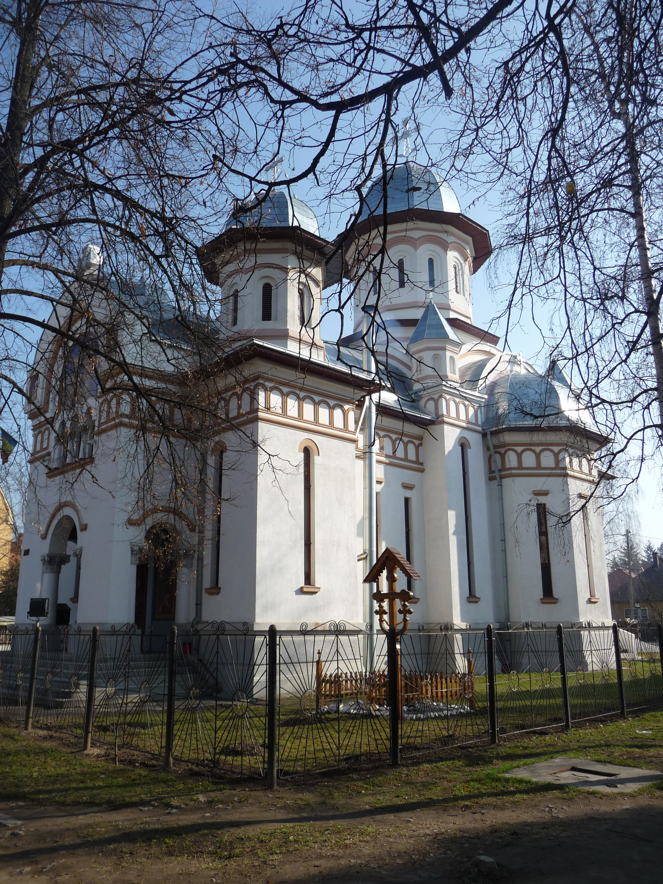 Ortodox templom, Gyergyószentmiklós (épült 1929 és 1937 között)